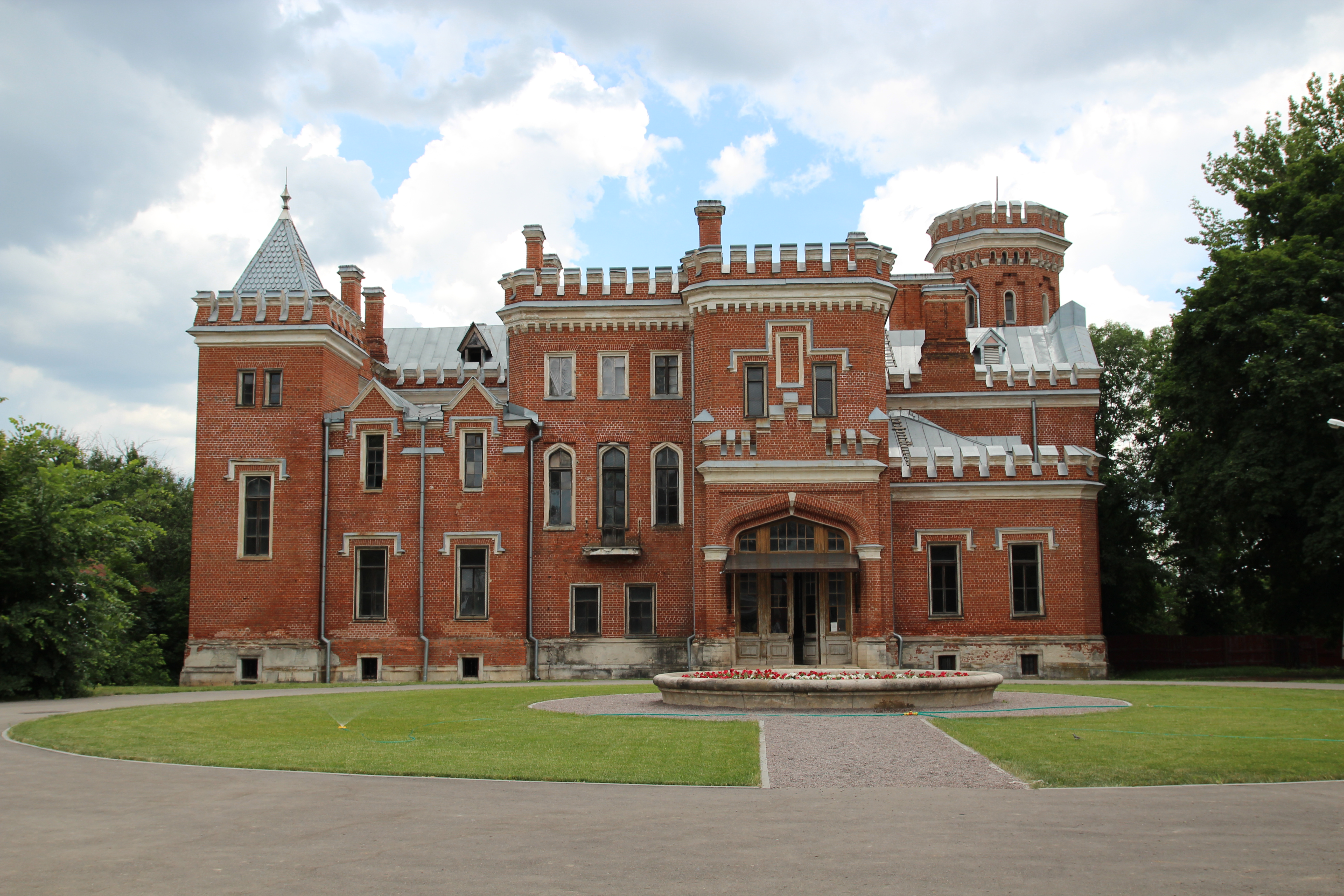 Рамонский дворец